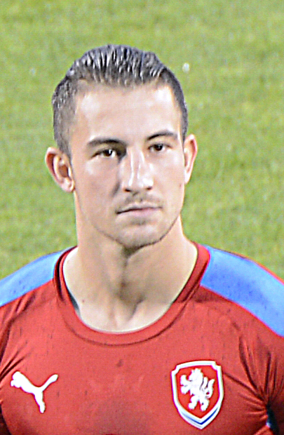 Mezinárodní fotbalový zápas Česko - Rakousko v Olomouce